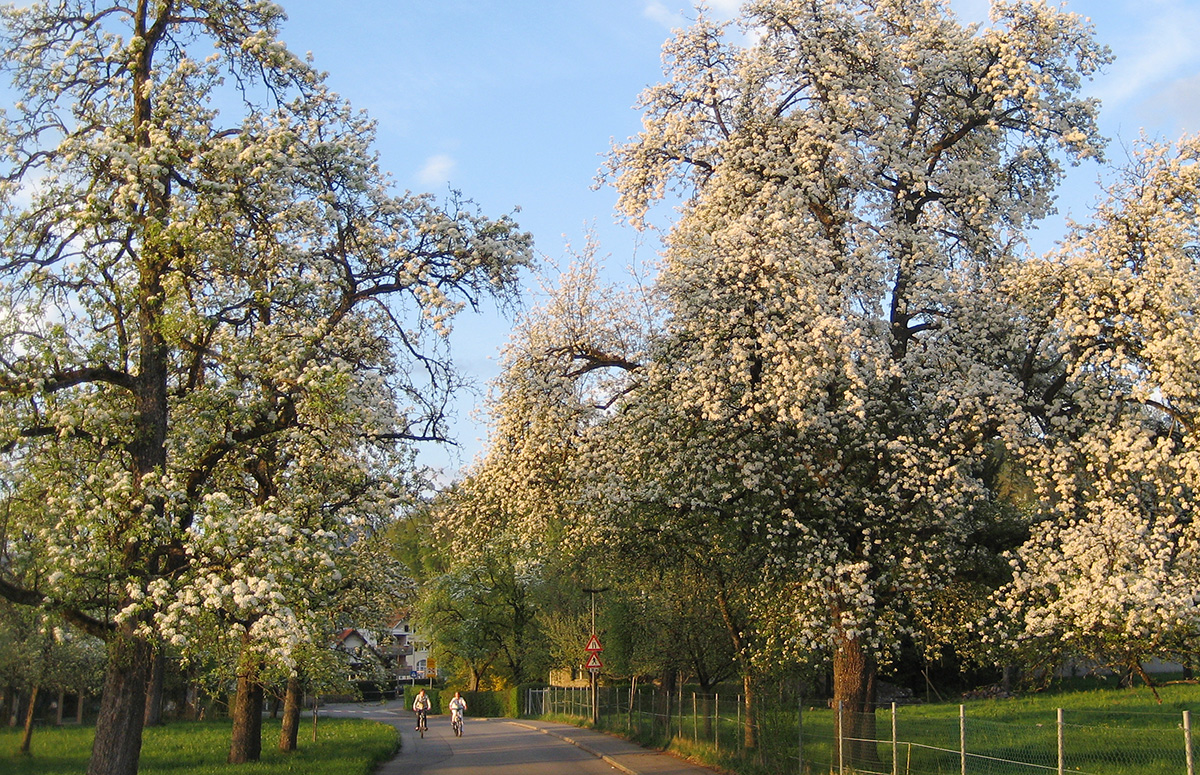 Hochstamm-Bäume im Ortsteil Rickenbach der Gemeinde Wolfurt, aufgenommen im April 2009.